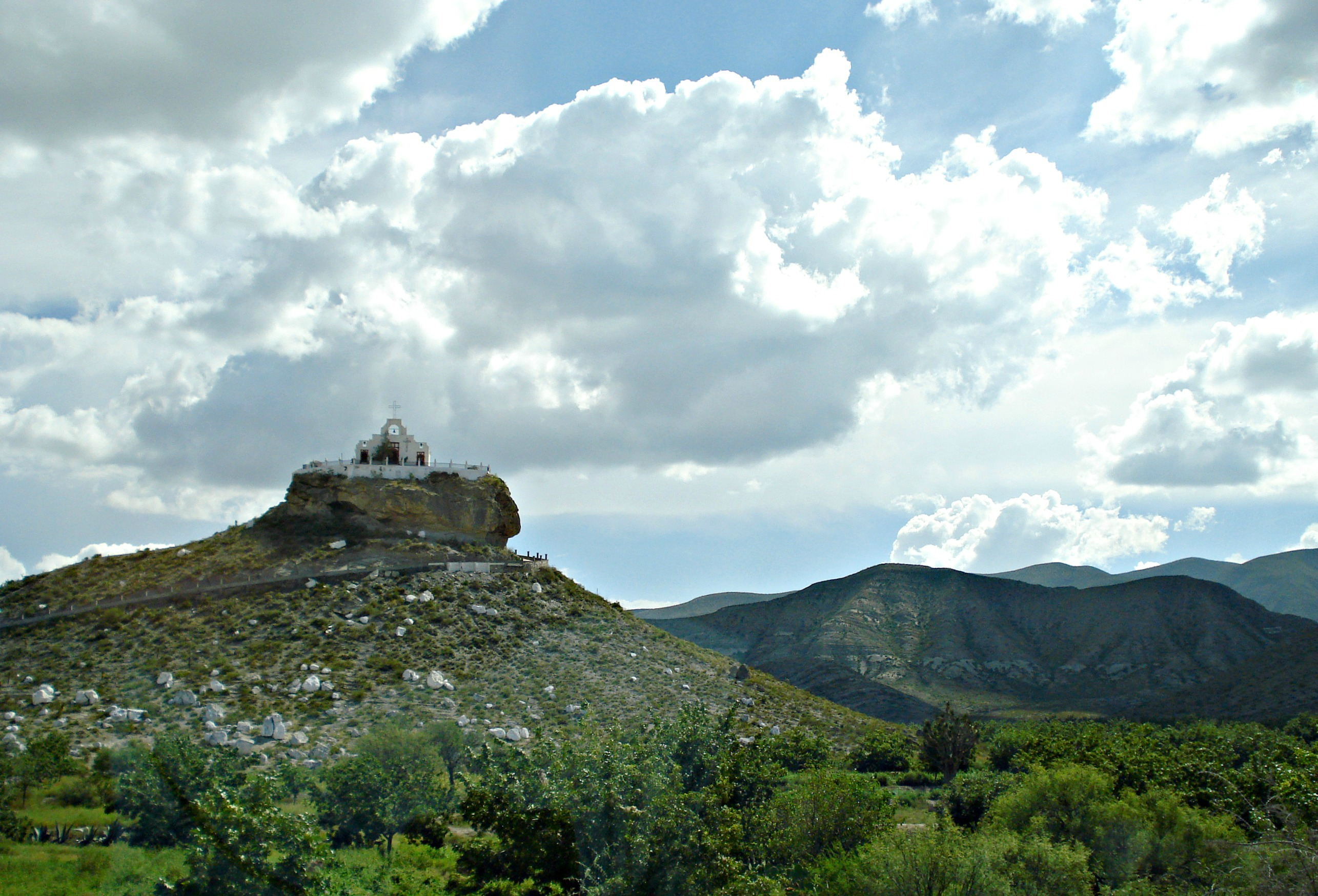 Capilla Santo Madero, Parras de la Fuente, Pueblo Mágico de Coahuila, México